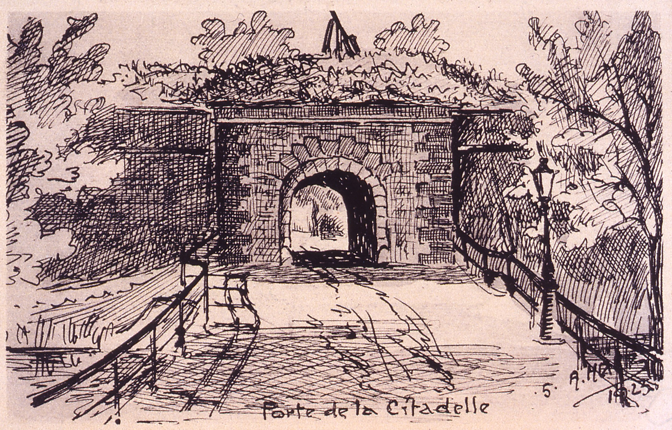 Dessin de la porte de la citadelle à Strasbourg